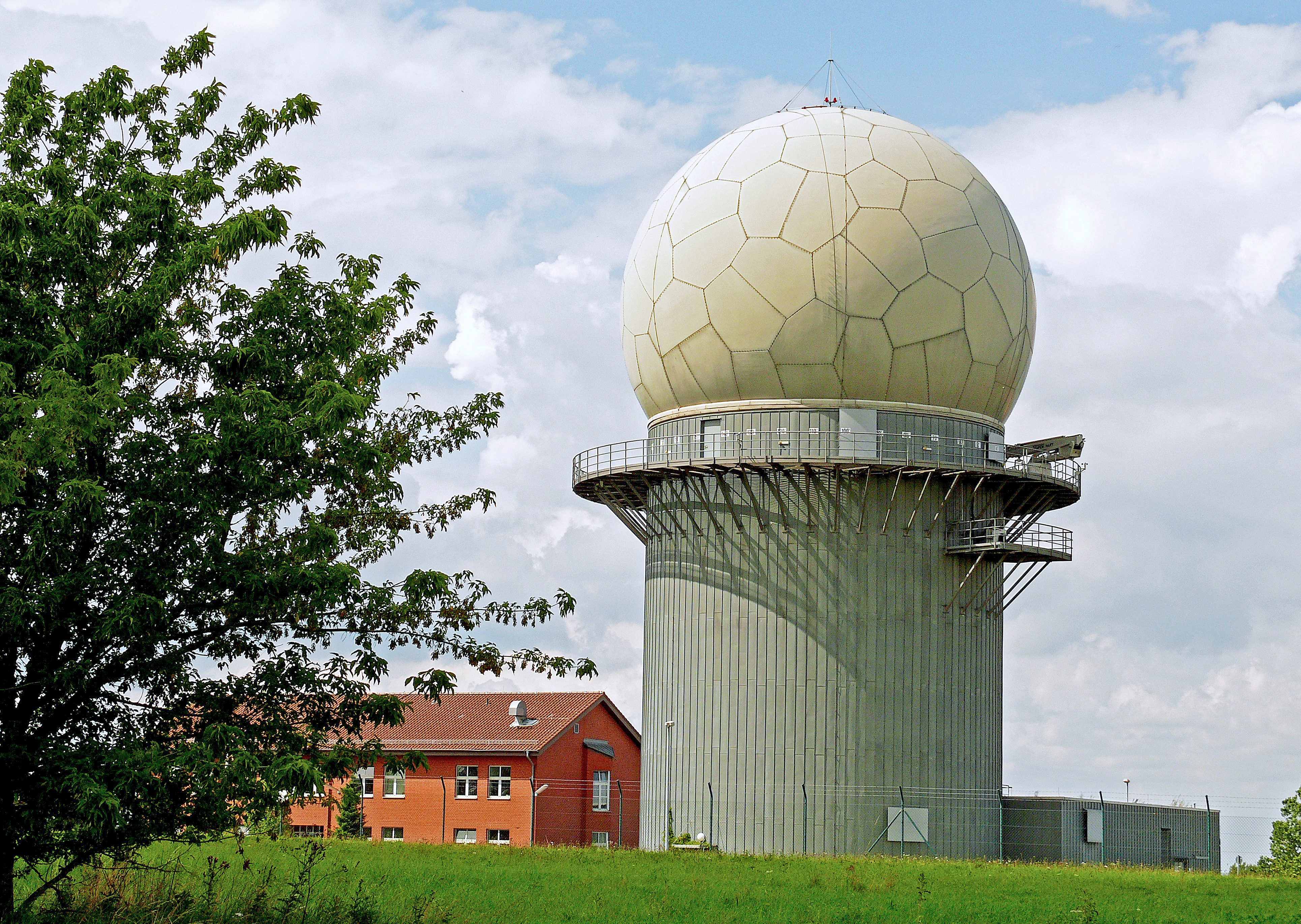 Bundeswehr Radaranlage Elmenhorst (MV)